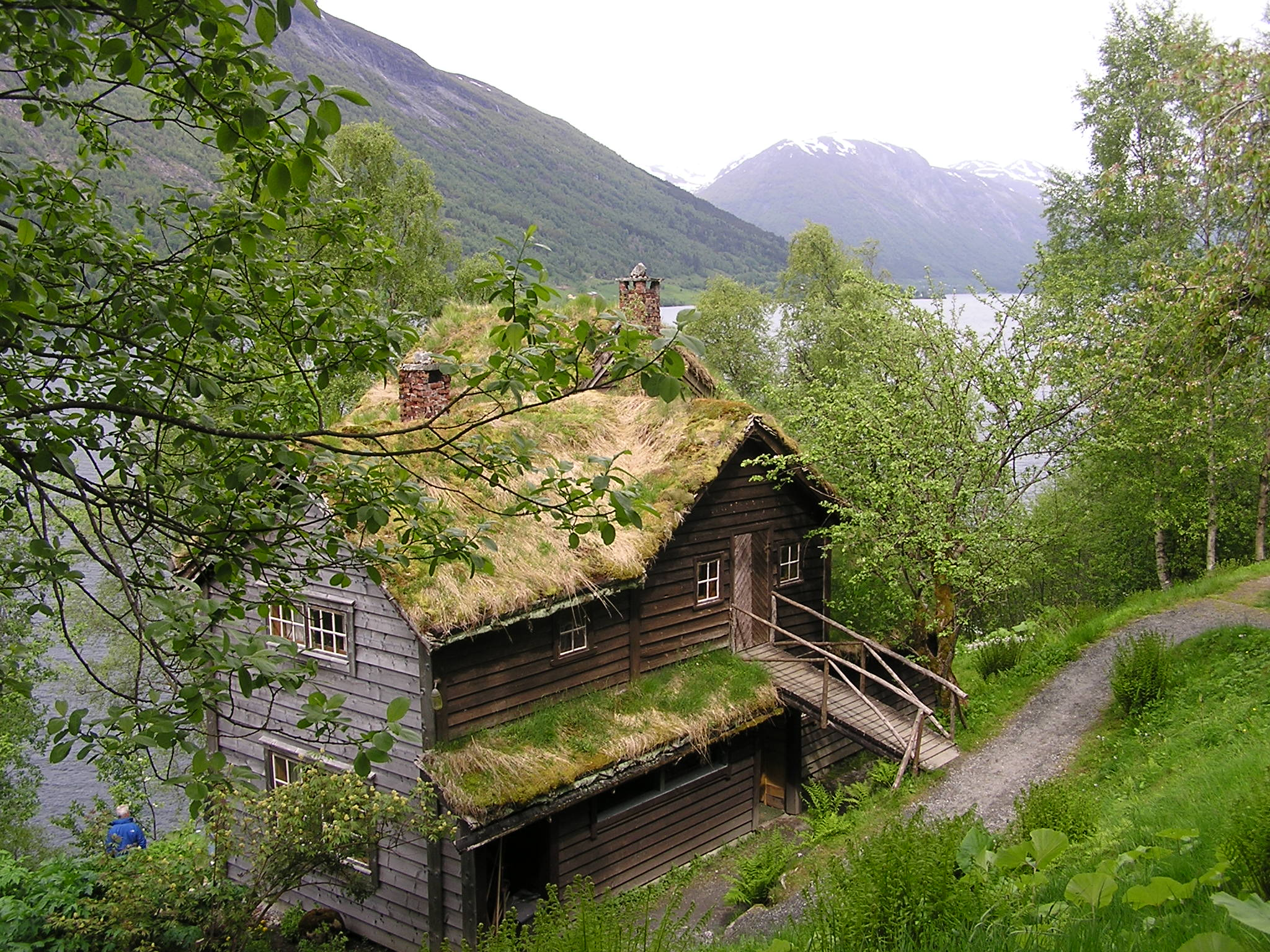 no: Astruptunet ved Jølstravatnet Home of painter Nikolai Astrup, on Jølster lake.